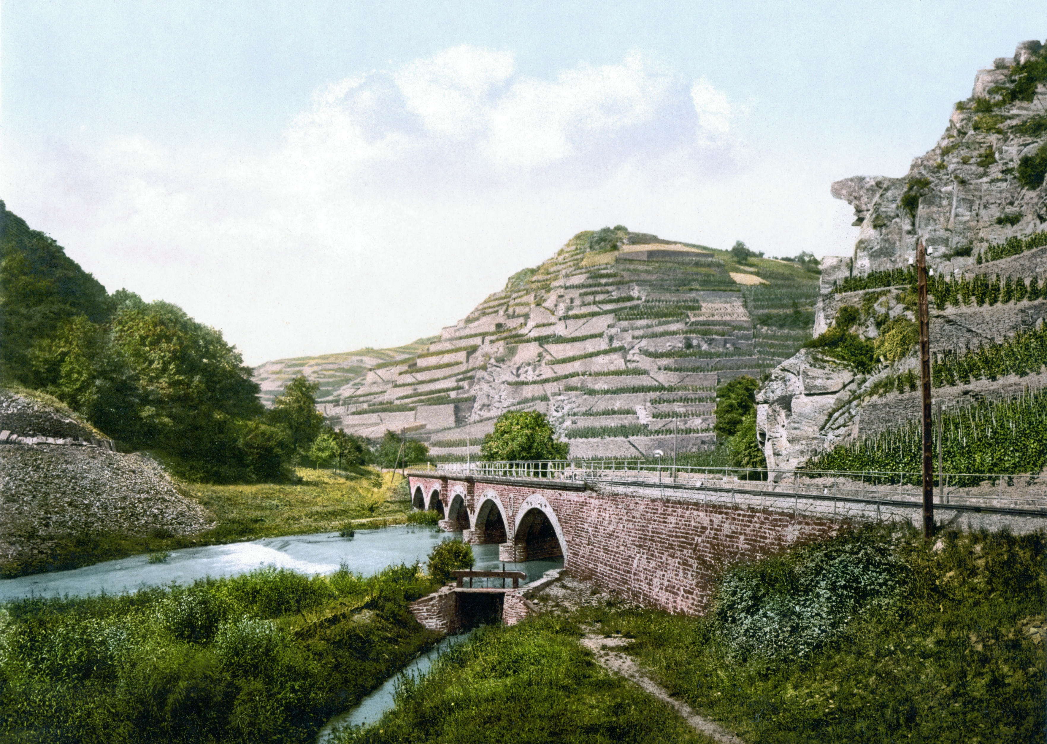 Bunte Kuh um 1900